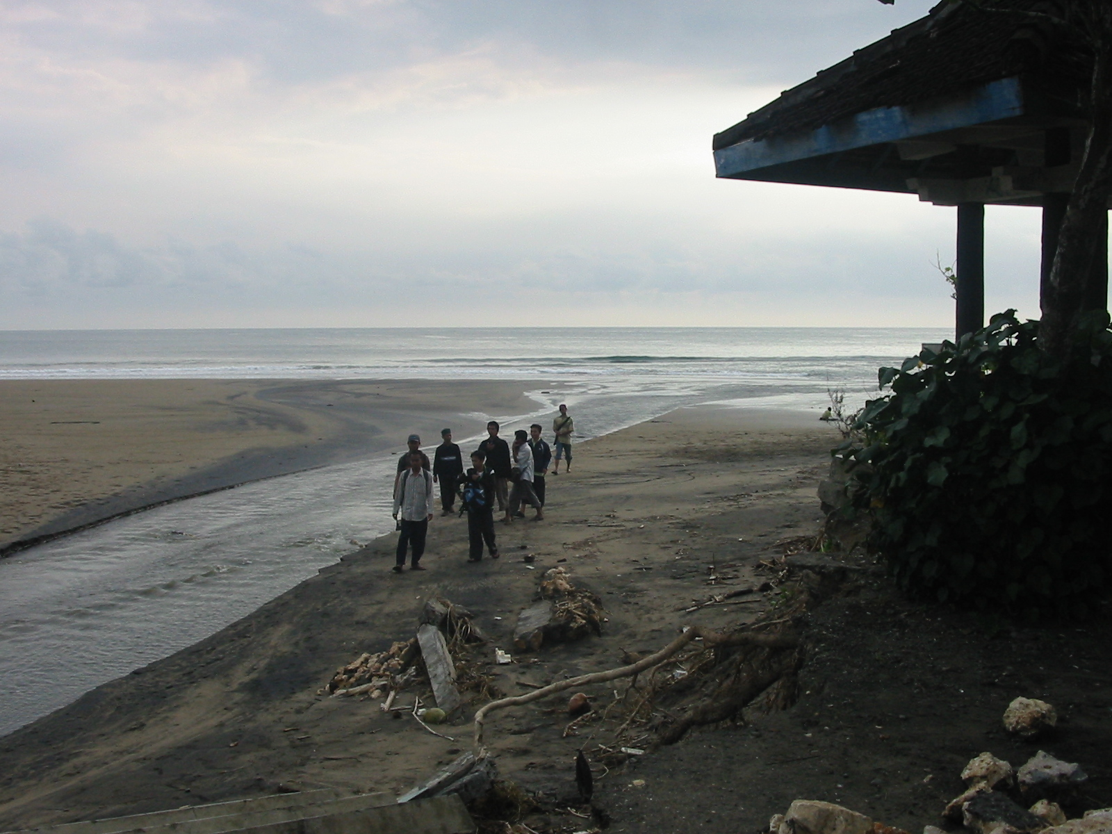 FT PANTAI SERANG BLITAR